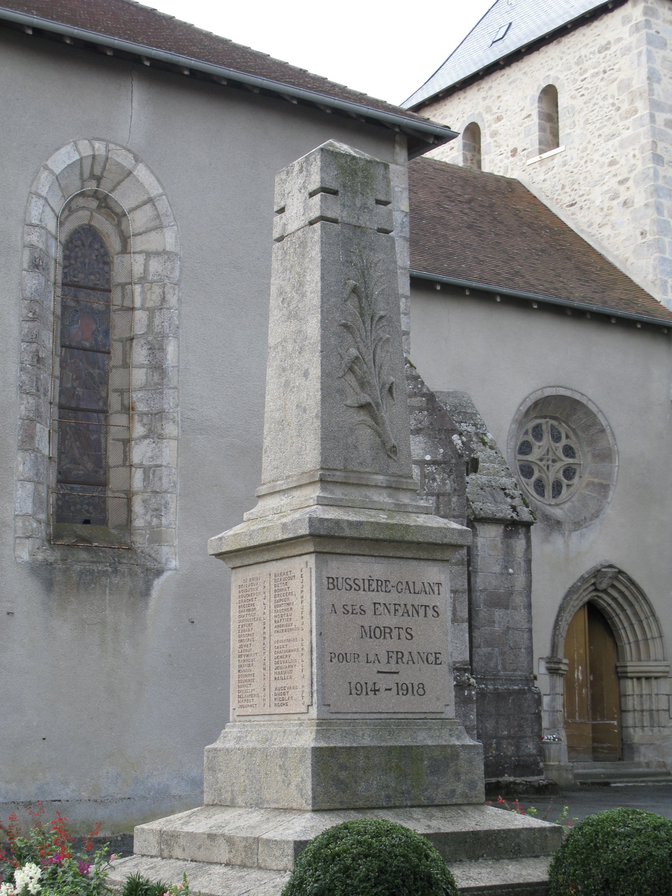 Monument aux morts, devant l'église, à Bussière-Galant